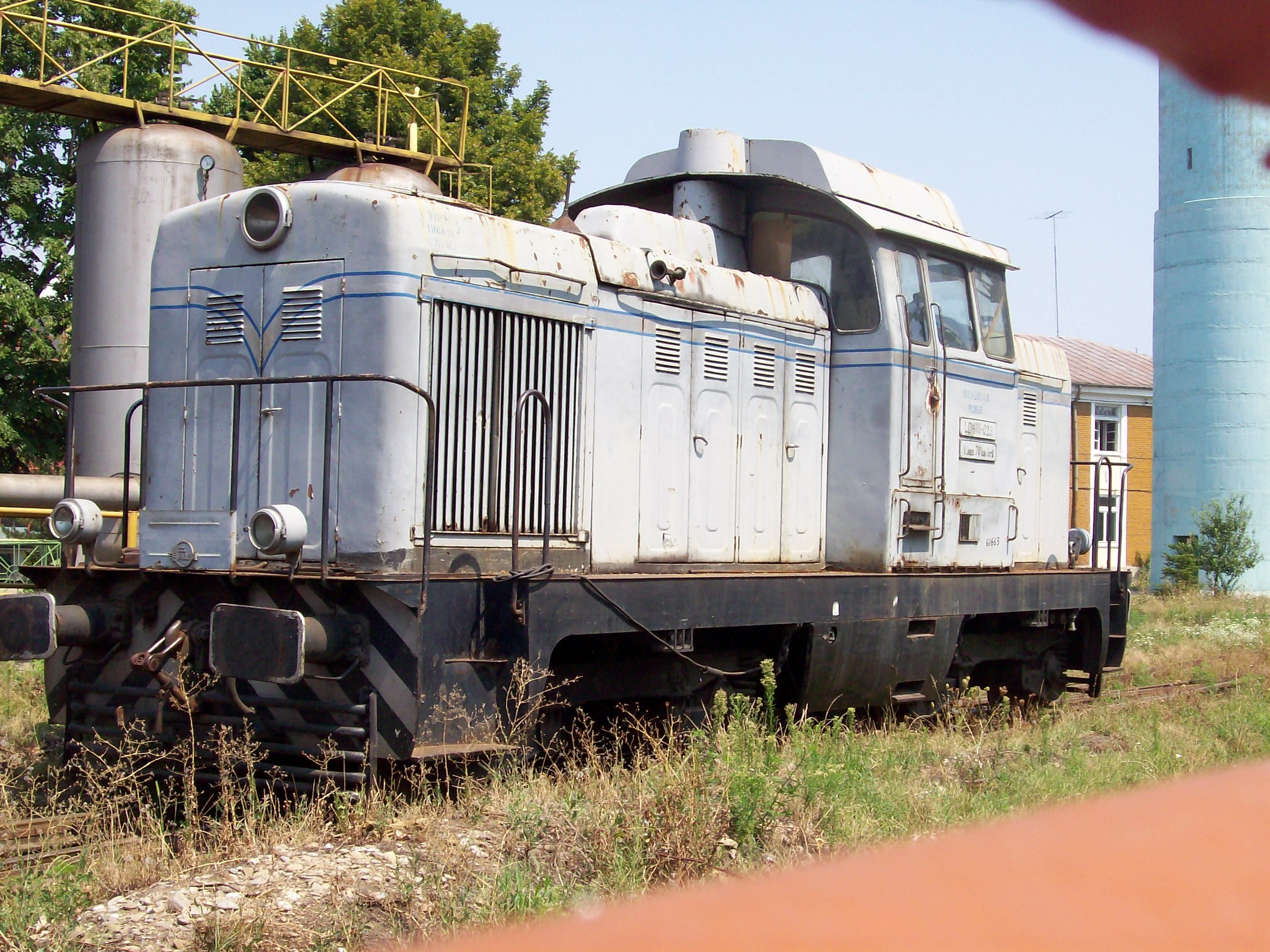 Locomotiva CFR clasa 86